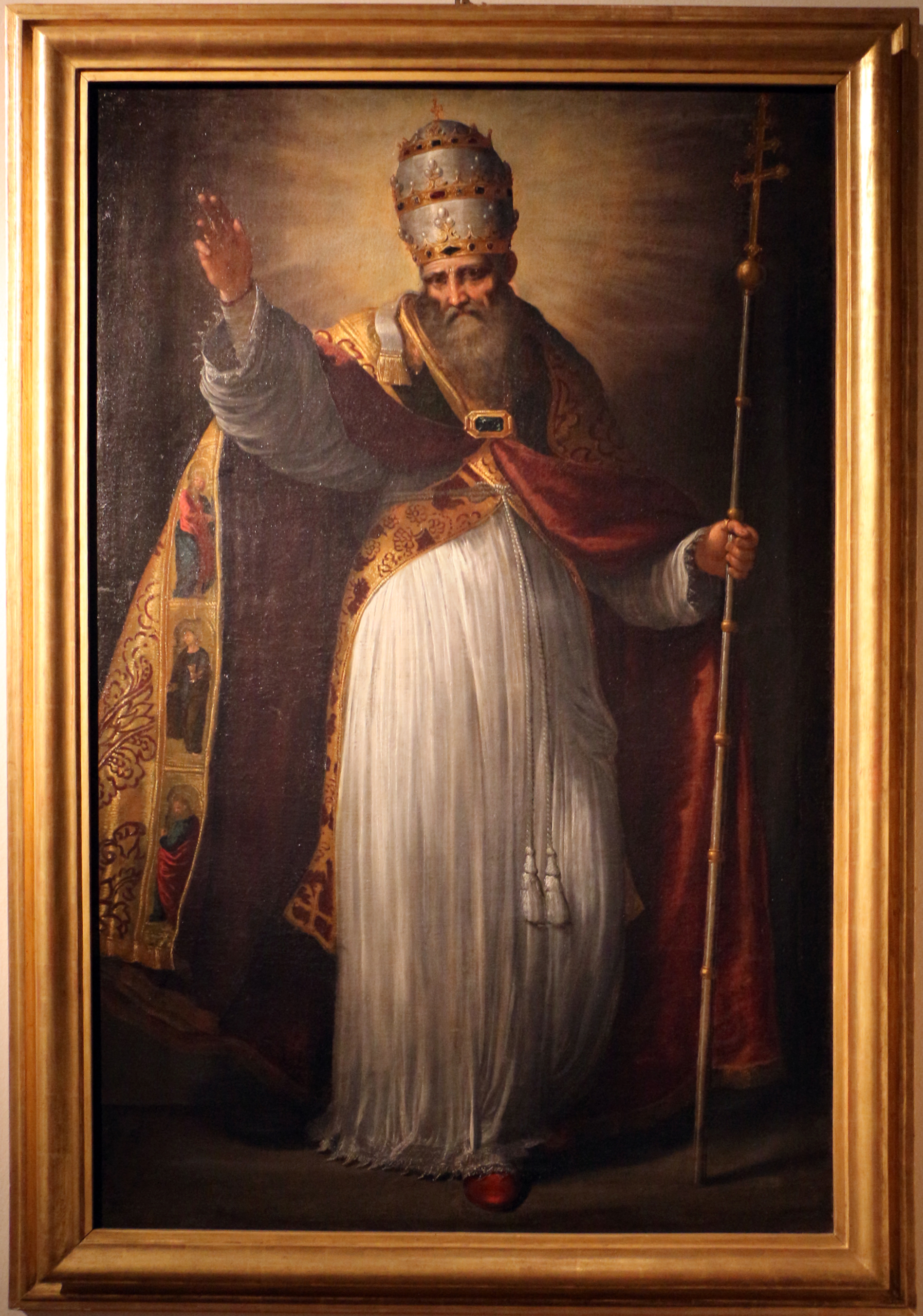 Palazzo dei Diamanti (Ferrara) This is a photo of a monument which is part of cultural heritage of Italy.